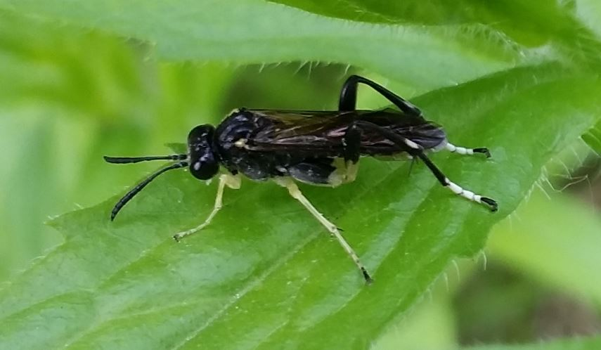 Bergblattwespe (Macrophya montana), Männchen, im Schwetzinger Hardt, am 11.06.2016